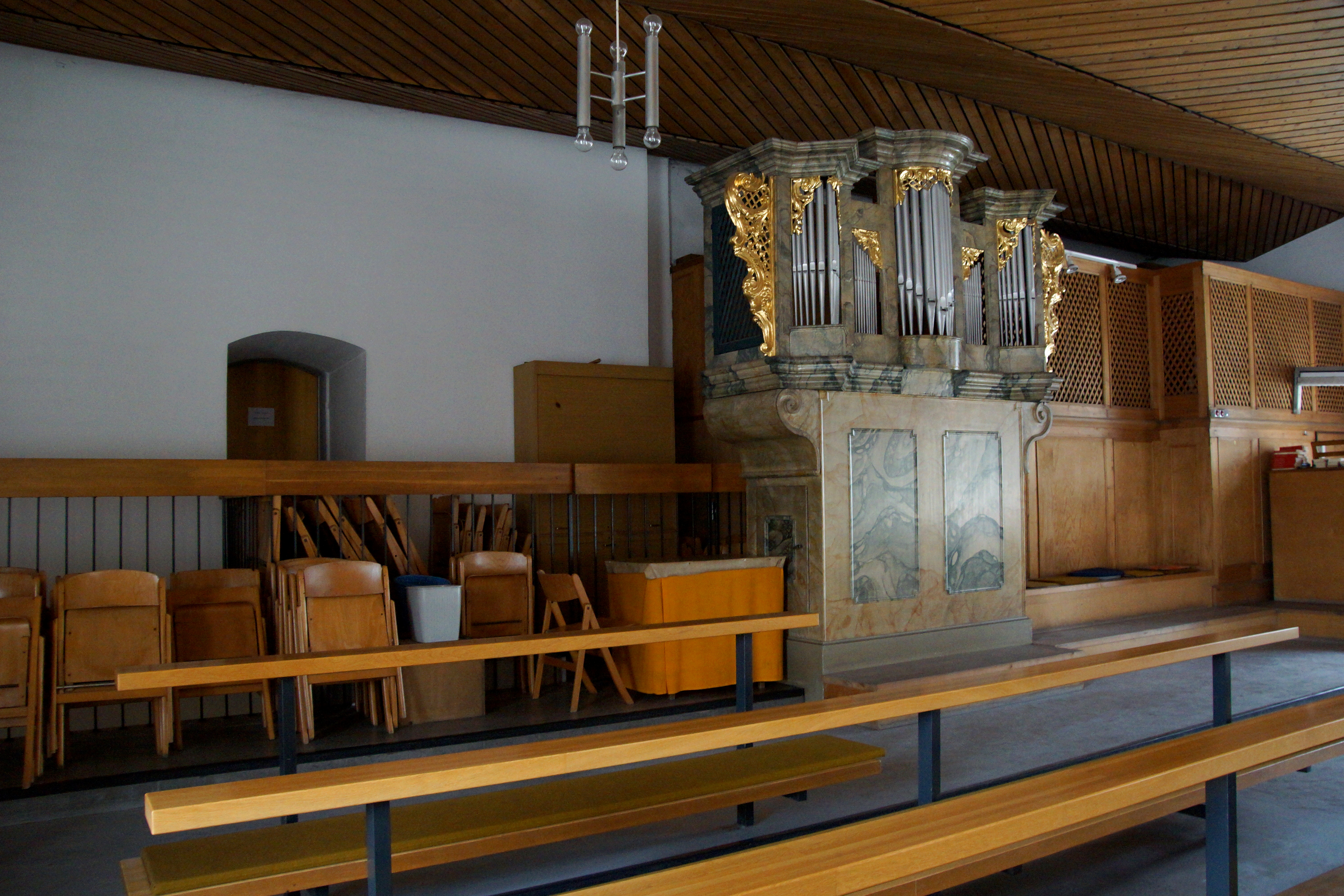 Die katholische Pfarrkirche St. Ägidius in Schmidmühlen in der Oberpfalz